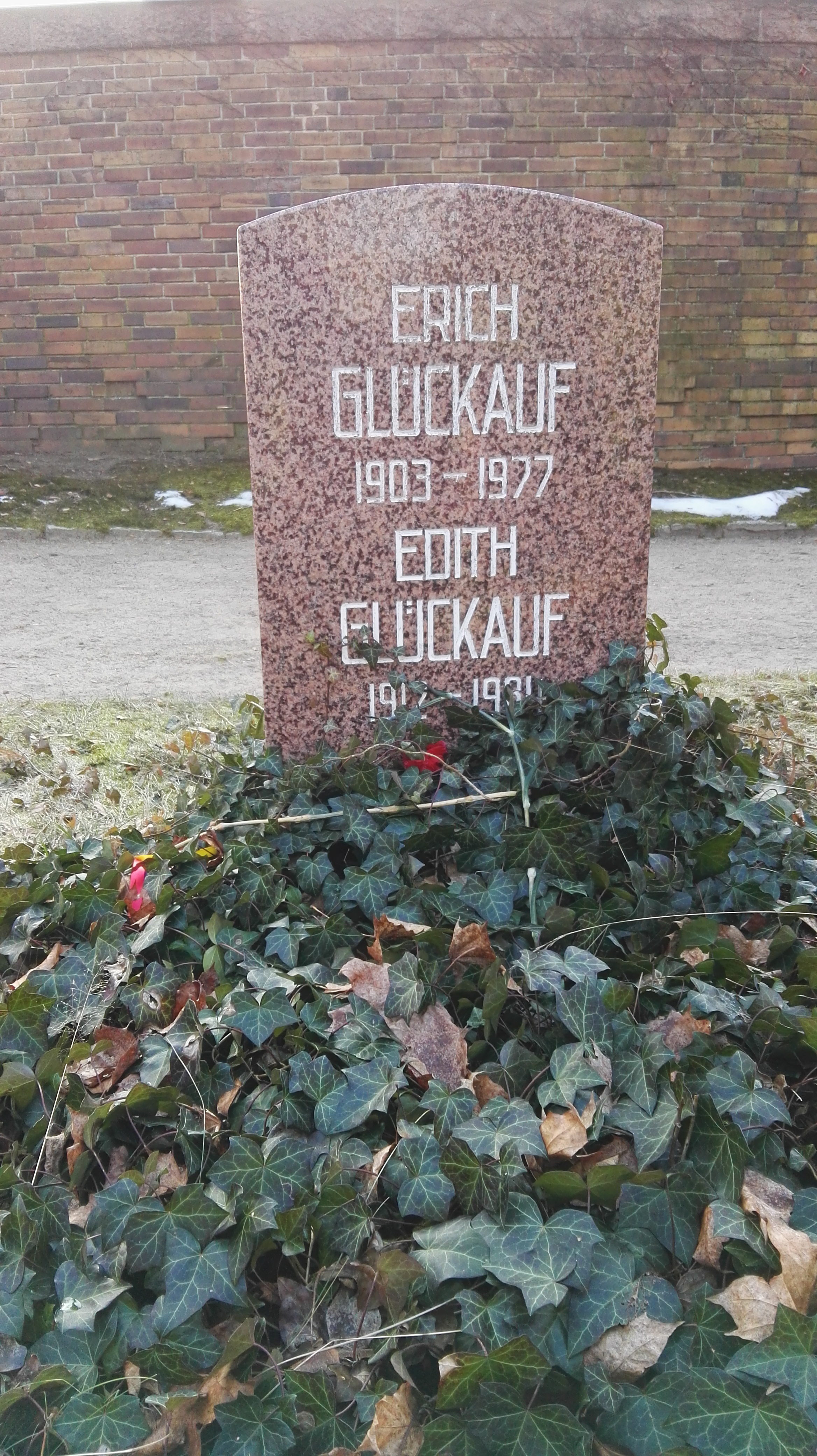 Grab von Erich Glückauf Edith Glückauf in der Grabanlage Pergolenweg auf dem Sozialistenfriedhof des Zentralfriedhofs Friedrichsfelde